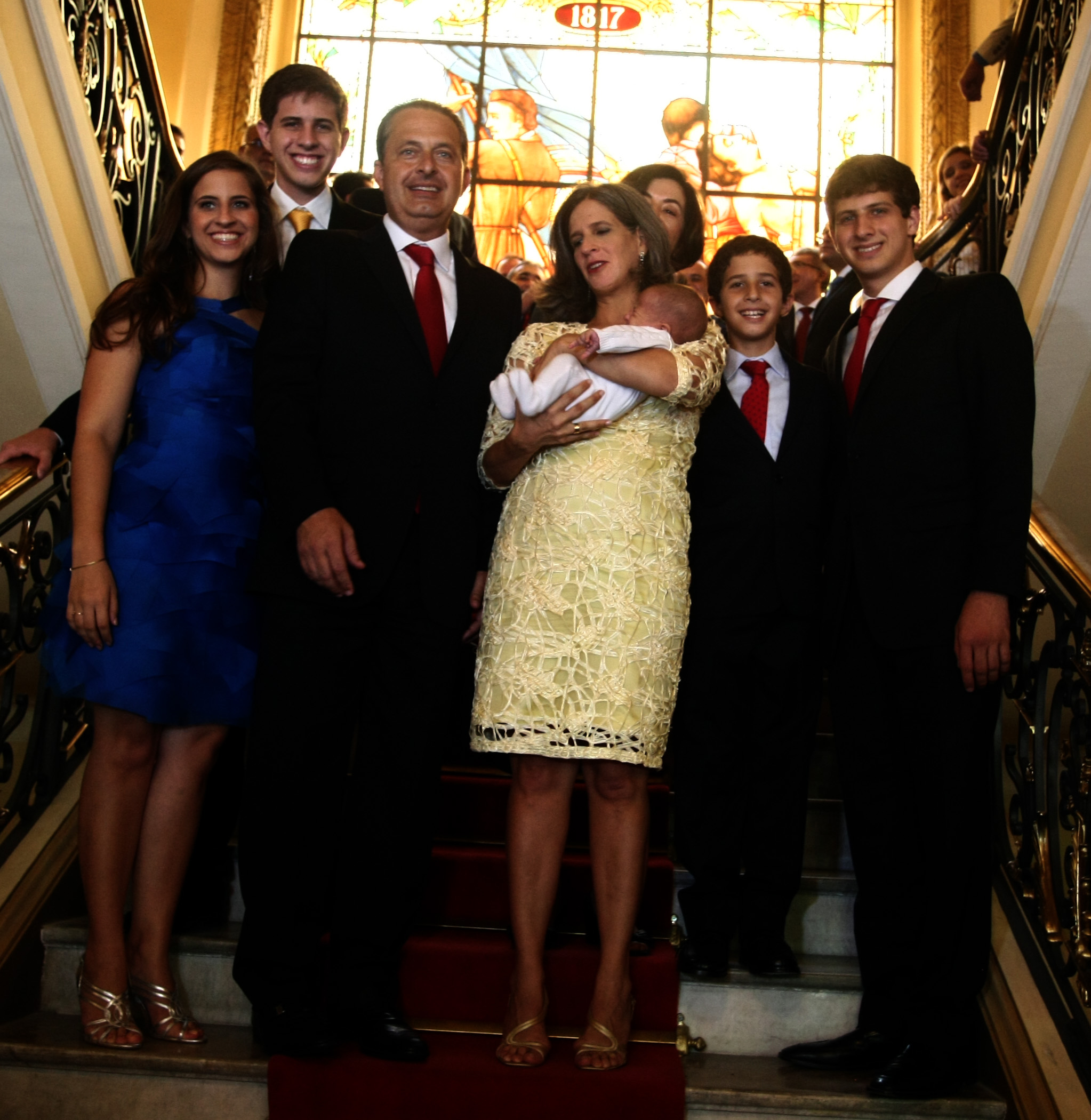 Família de Eduardo Campos no Palácio do Campo das Princesas, Recife, Pernambuco, Brasil. Fotografia: Aluisio Moreira/SEI